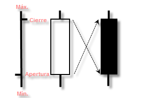 Velasbasico